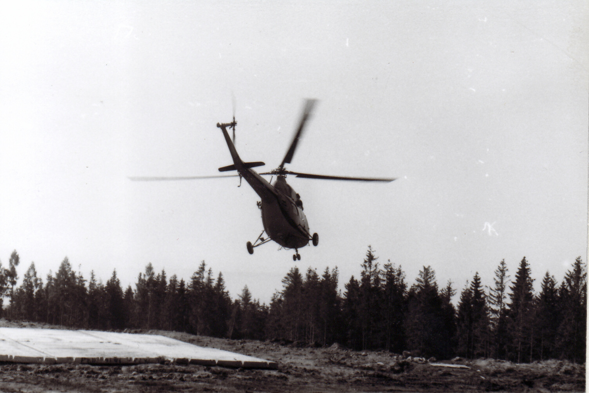 Vrtuľník na heliporte v Starom Smokovci